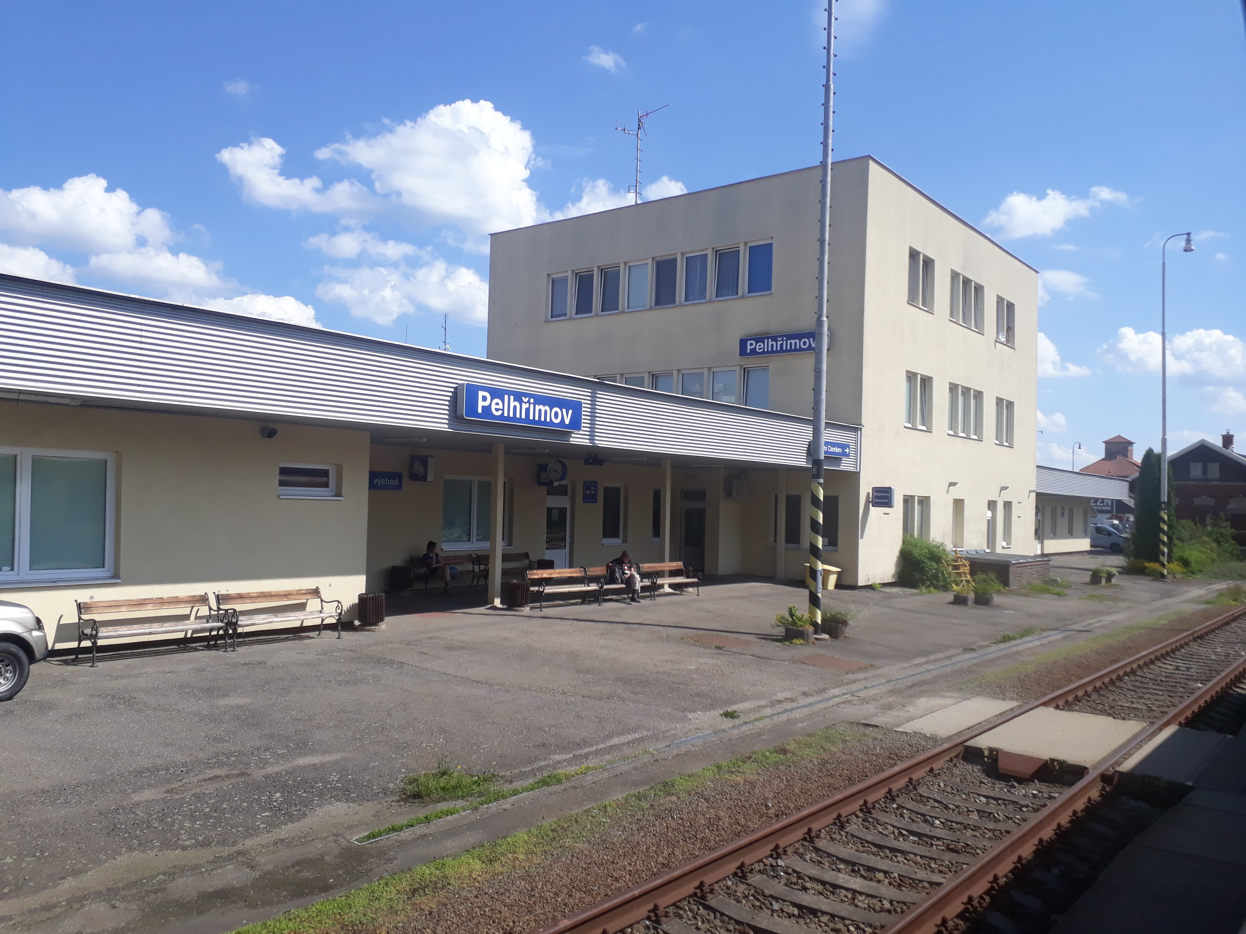 Budova železniční stanice Pelhřimov (postavená roku 1988 podnikem OSP Humpolec)